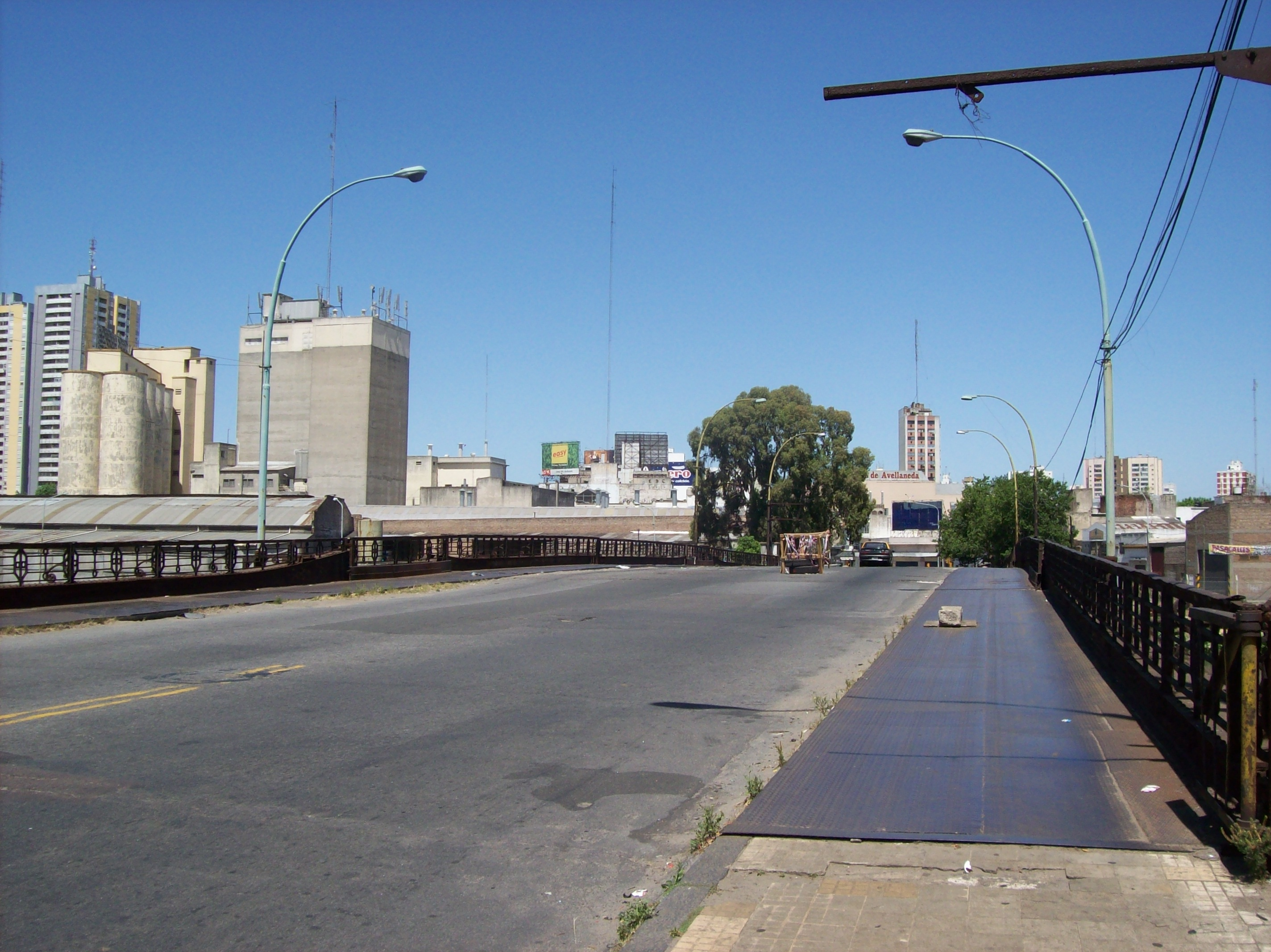 Calzada del Viejo Puente Pueyrredón que cruza el Riachuelo entre el barrio porteño de Barracas y la ciudad de Avellaneda.